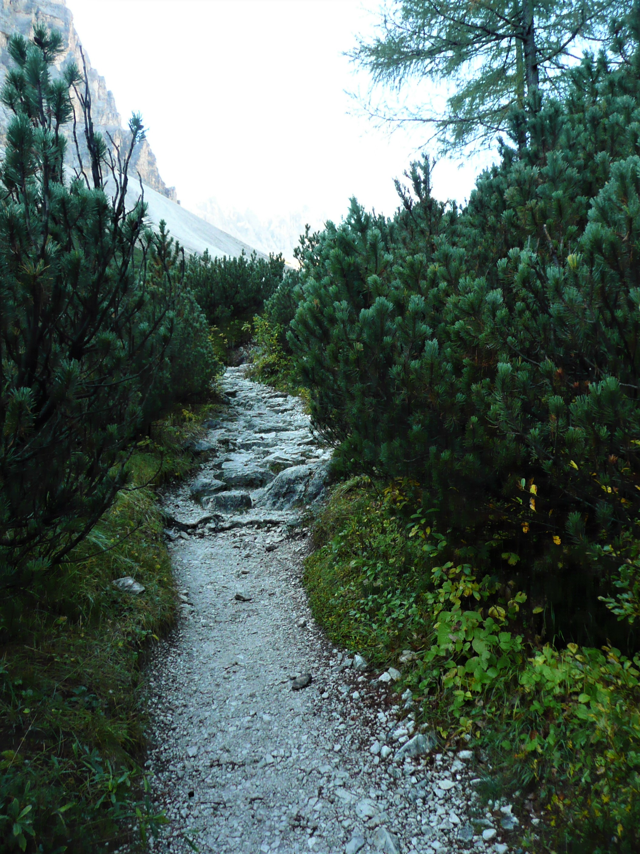 Anstieg durch das Altensteiner Tal vom Fischleintal aus